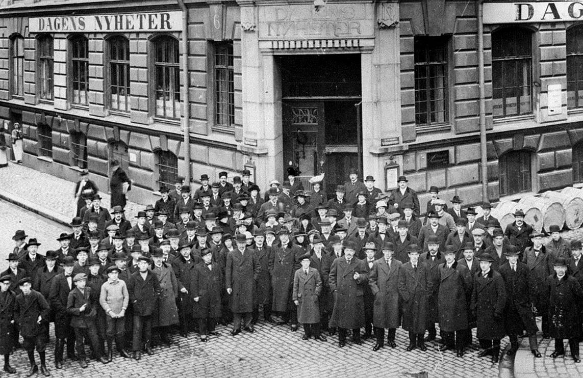 Dagens Nyheter personal på Klara Västra Kyrkogata 6